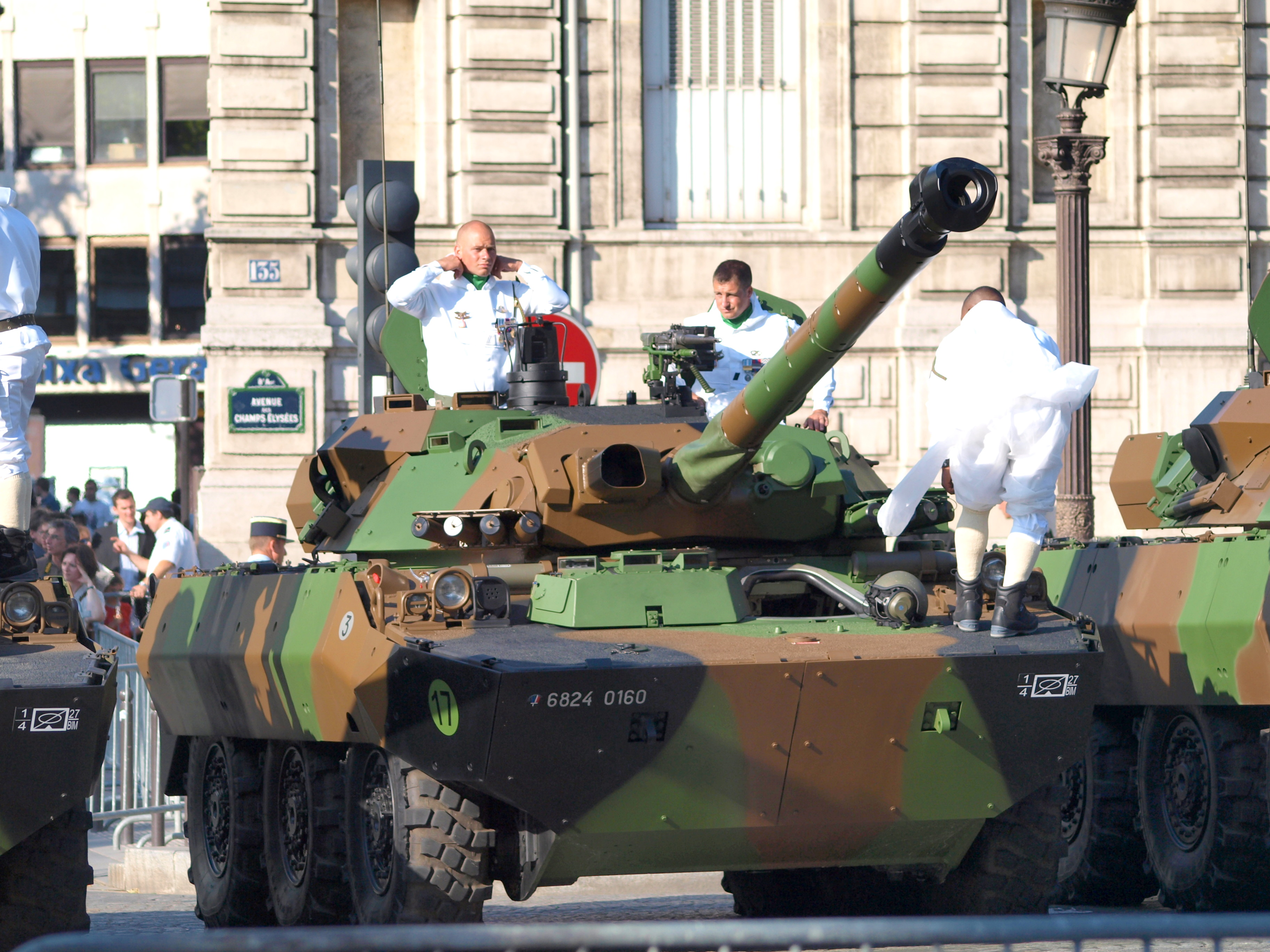 ACMAT VLRA, (Véhicule Léger de Reconnaissance et d'Appui) AMX 10 RC, French army licence registration '6824 0160'